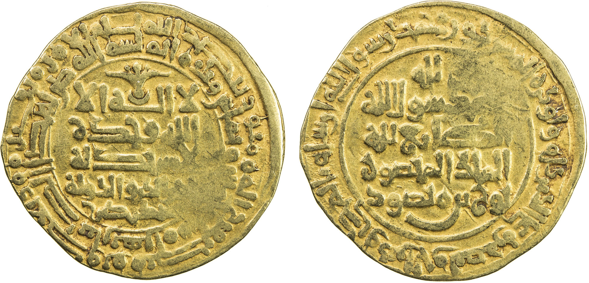 سکه یک دینار سبکتکین